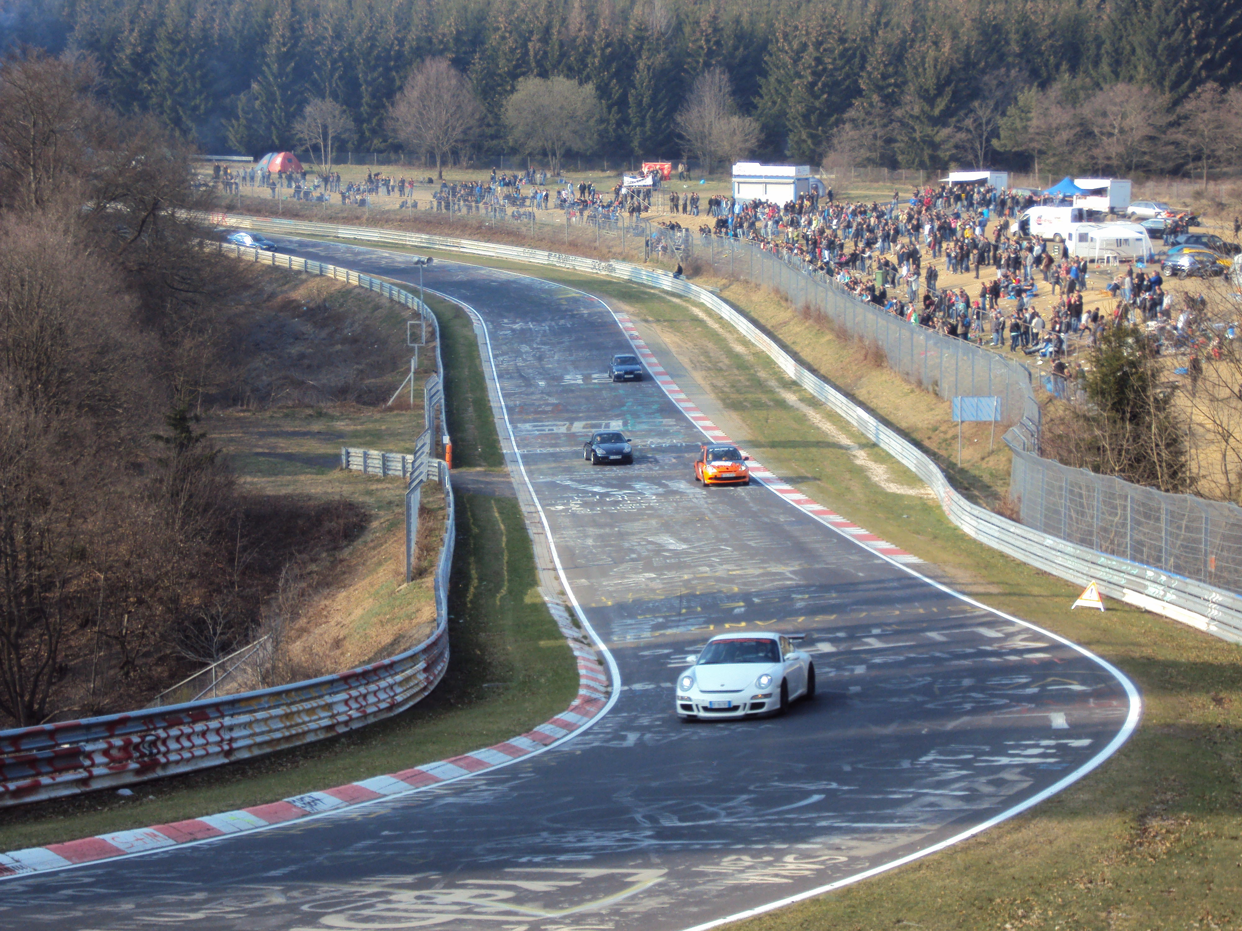 Streckenabschnitt Brünnchen der Nürburgring-Nordschleife.